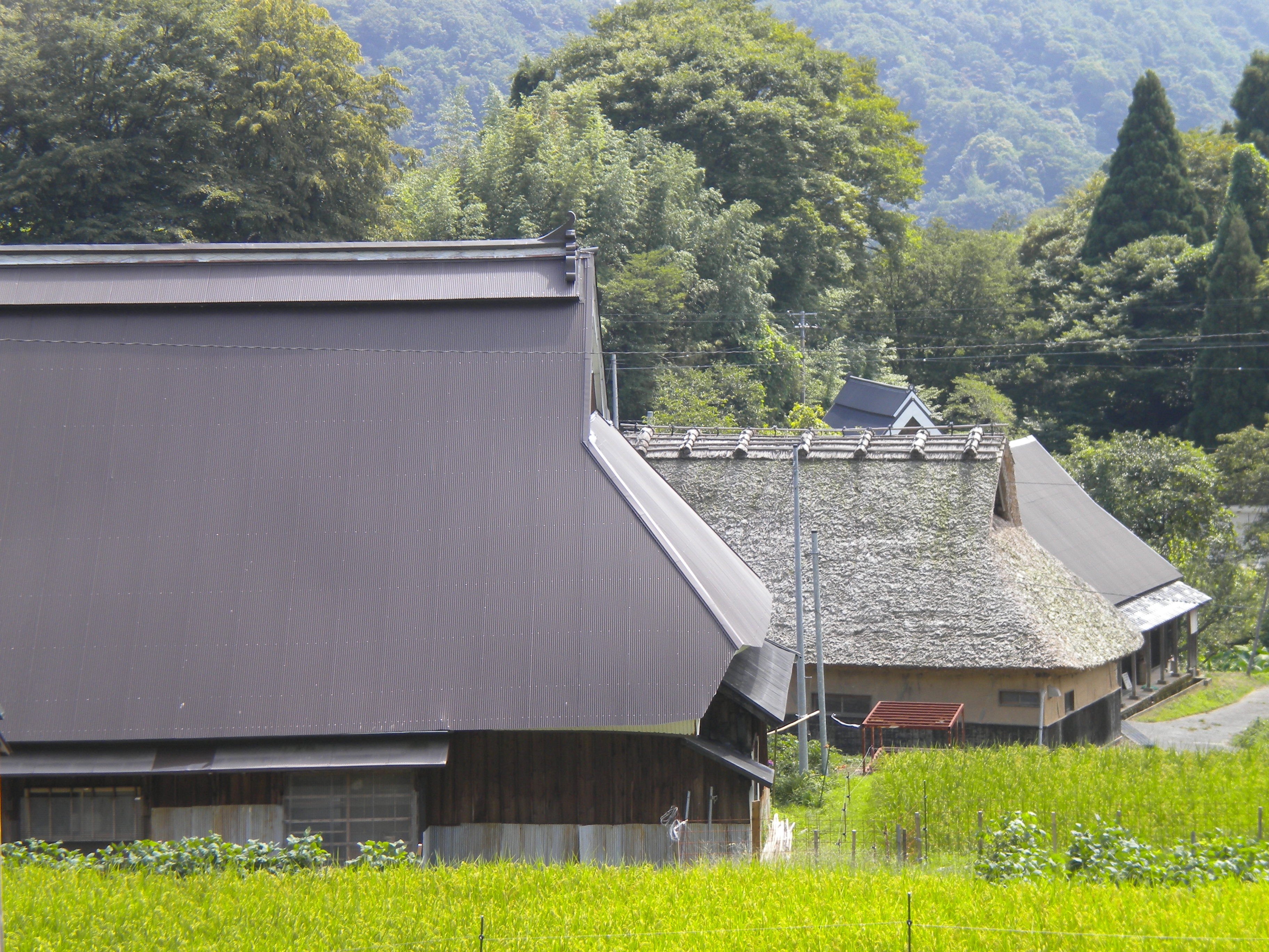 宮津市上世屋地区(9月)